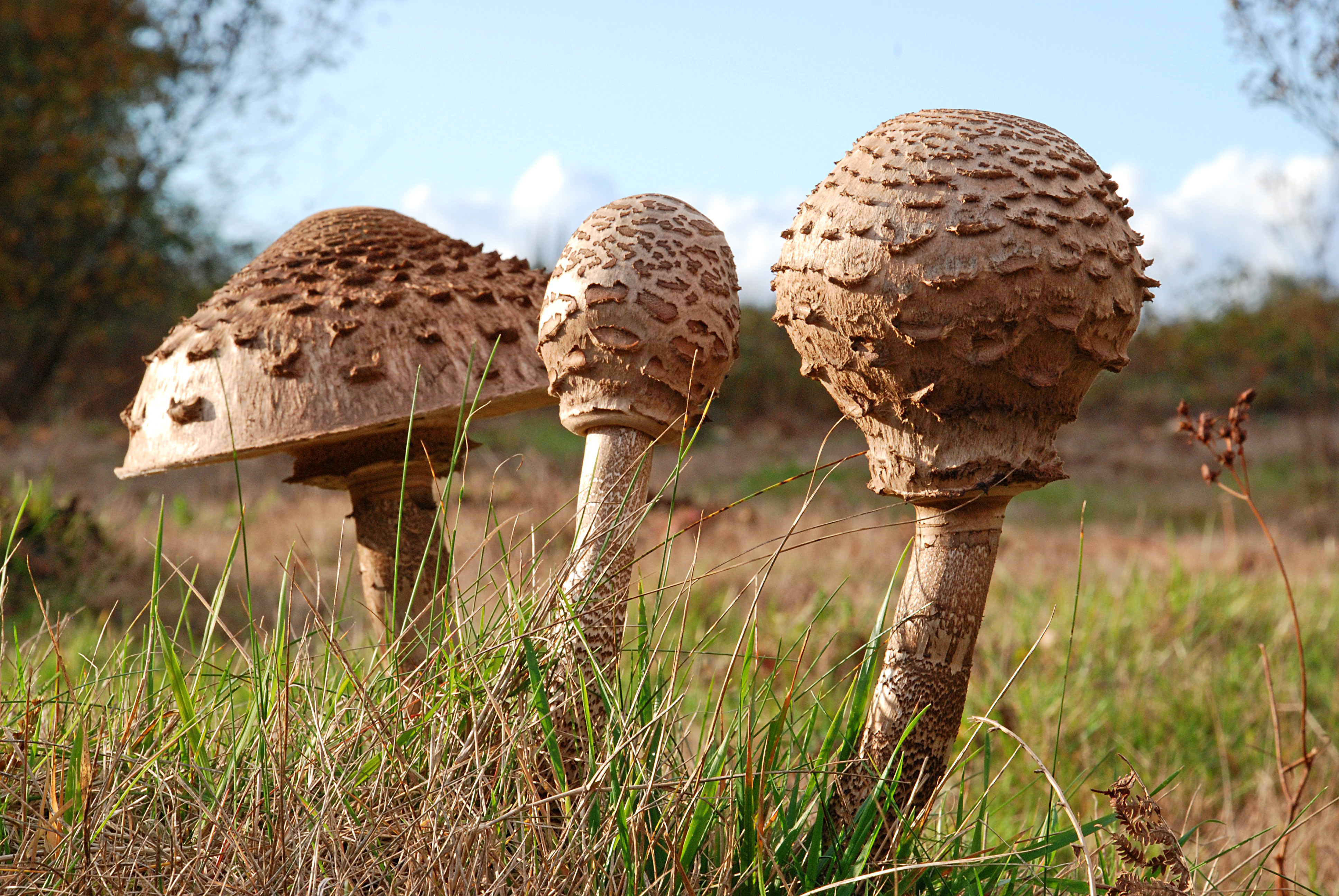 Grote parasolzwammen